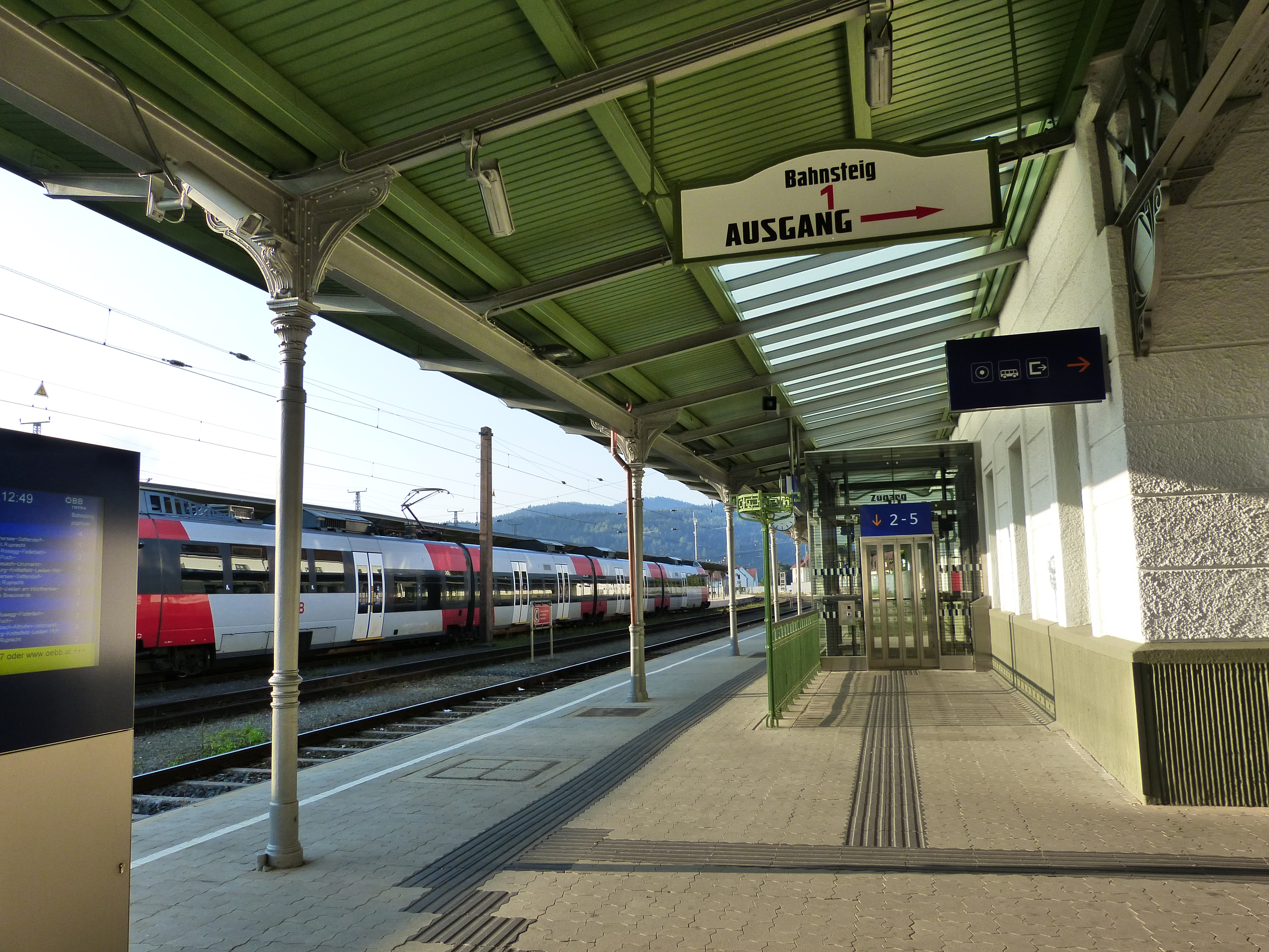 denkmalgeschützter Bahnhof St. Veit / Glan nach Renovierung 2015: Bahnsteig 1